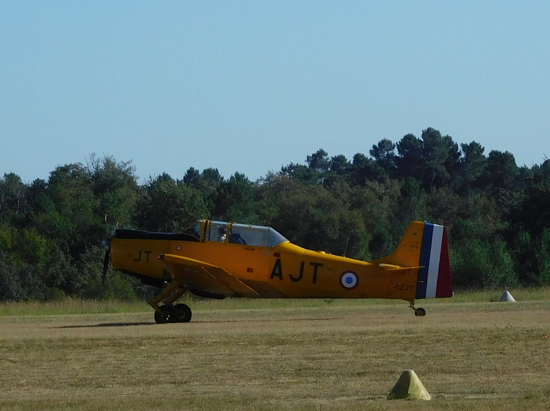 Nord 3202, F-AZJT, moteur Potez 4D32 de 240 ch.